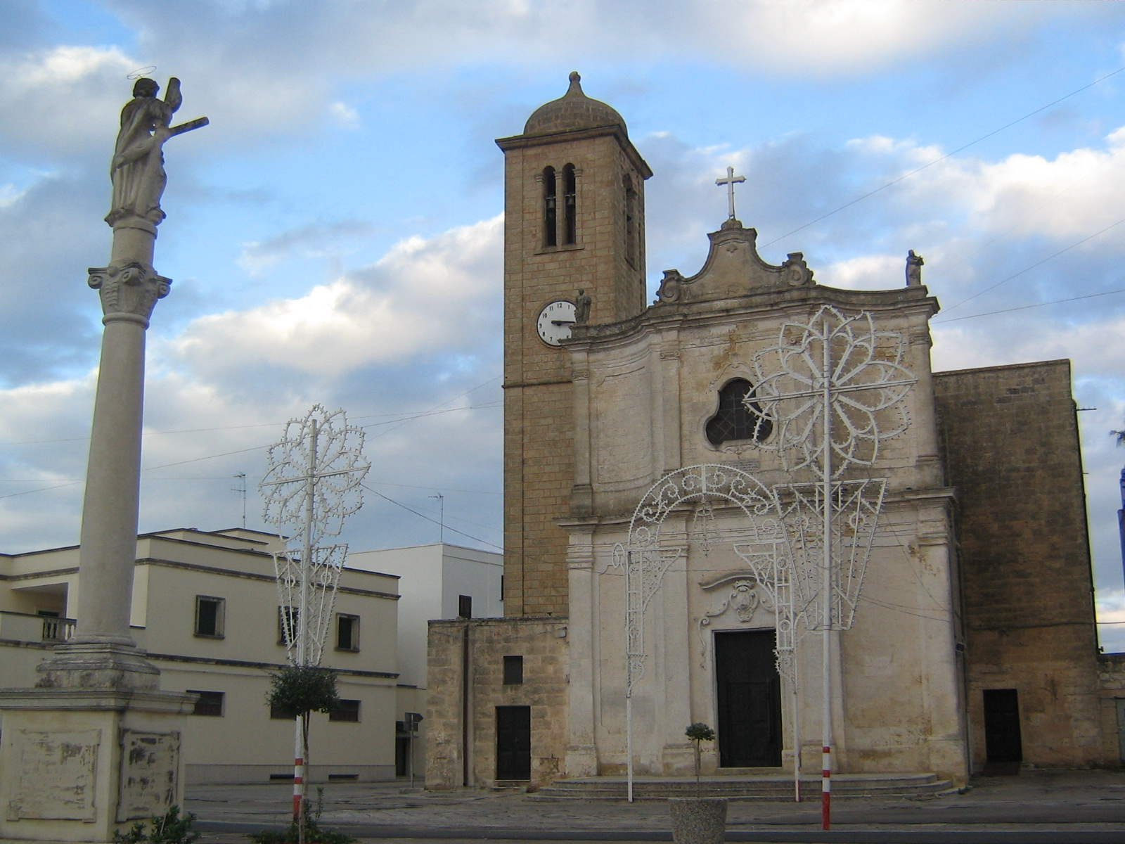 Caprarica del Capo, frazione di Tricase: la Chiesa Madre di Sant'Andrea.